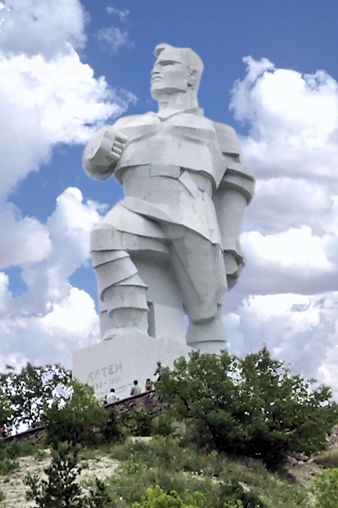 Пам'ятник радянському партійному і державному діячеві Артему (Ф. А. Сергеєву), Святогірськ, гора Артема